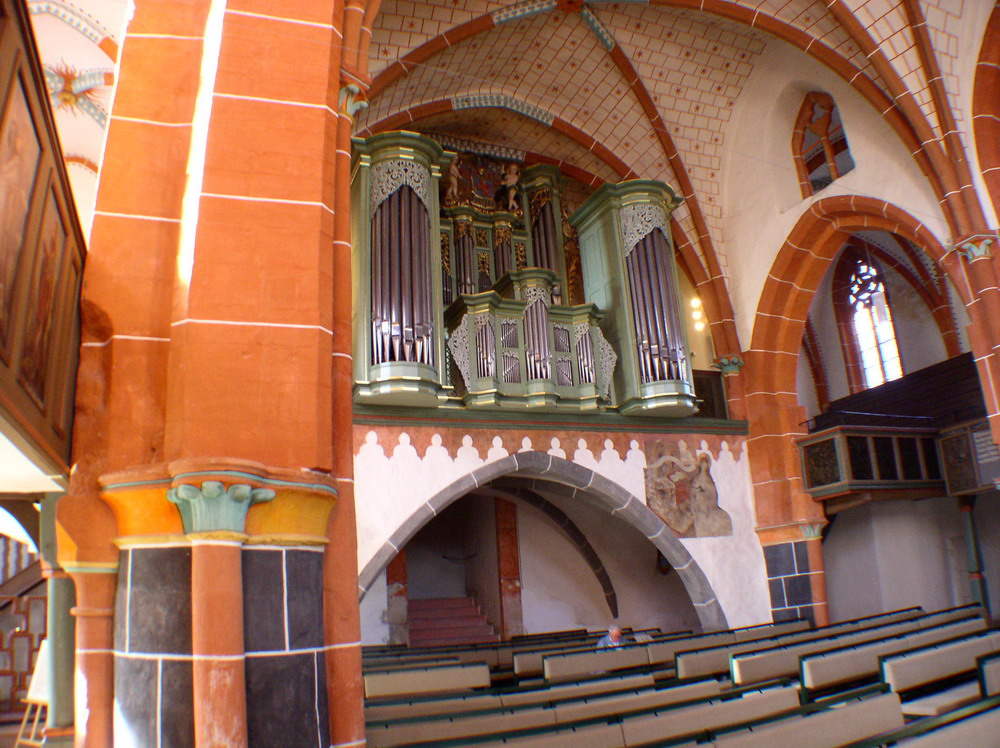 Innenansicht Walpurgiskirche 2